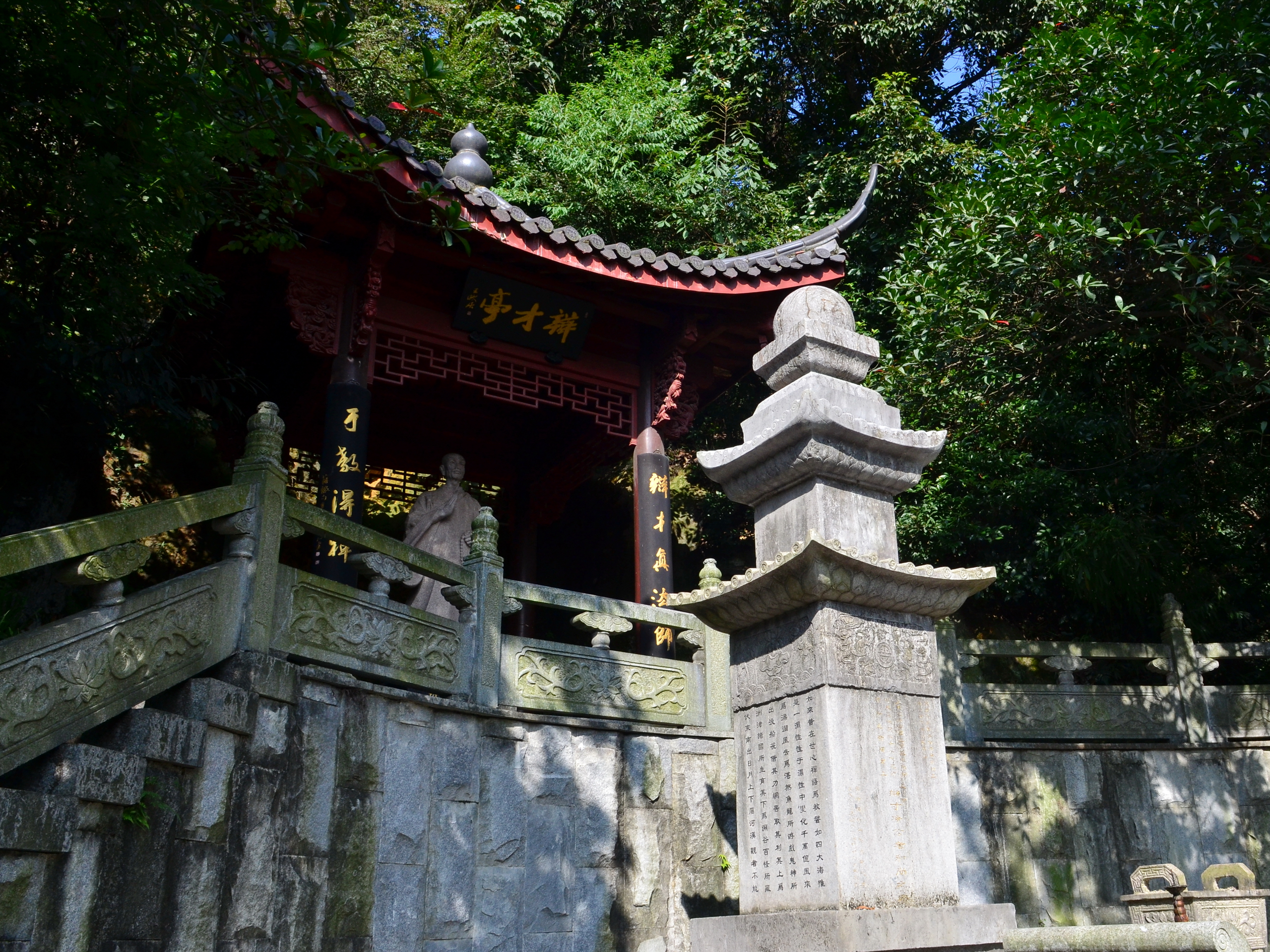 杭州西湖狮峰山麓老龙井御茶园纪念“龙井茶鼻祖”辩才法师所修建的辩才亭